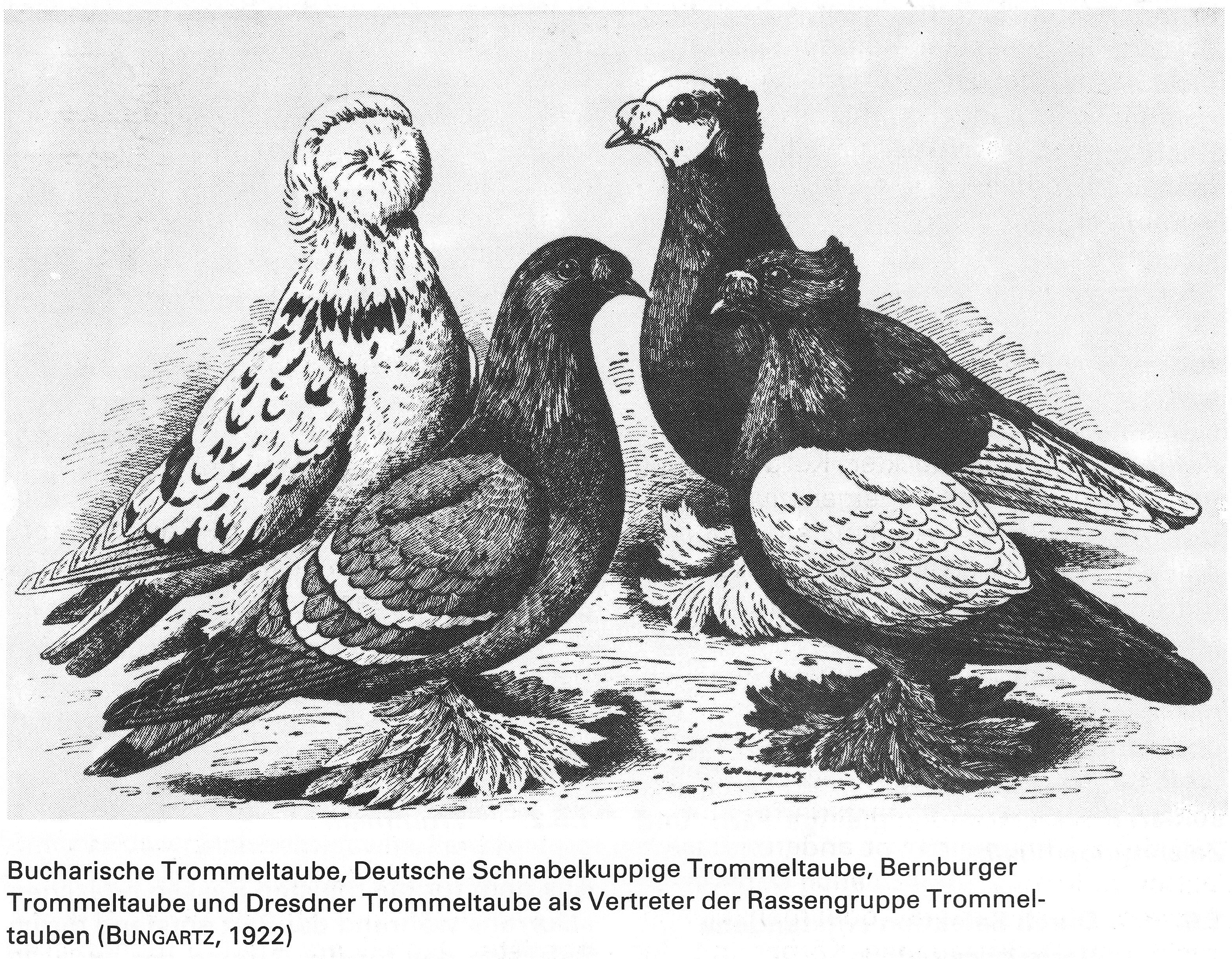 Bucharische Trommeltaube, Deutsche Schnabelkuppige Trommeltaube, Bernburger Trommeltaube und Dresdner Trommeltaube als Vertreter der Rassengruppe Trommeltauben (BUNGARTZ, 1922)